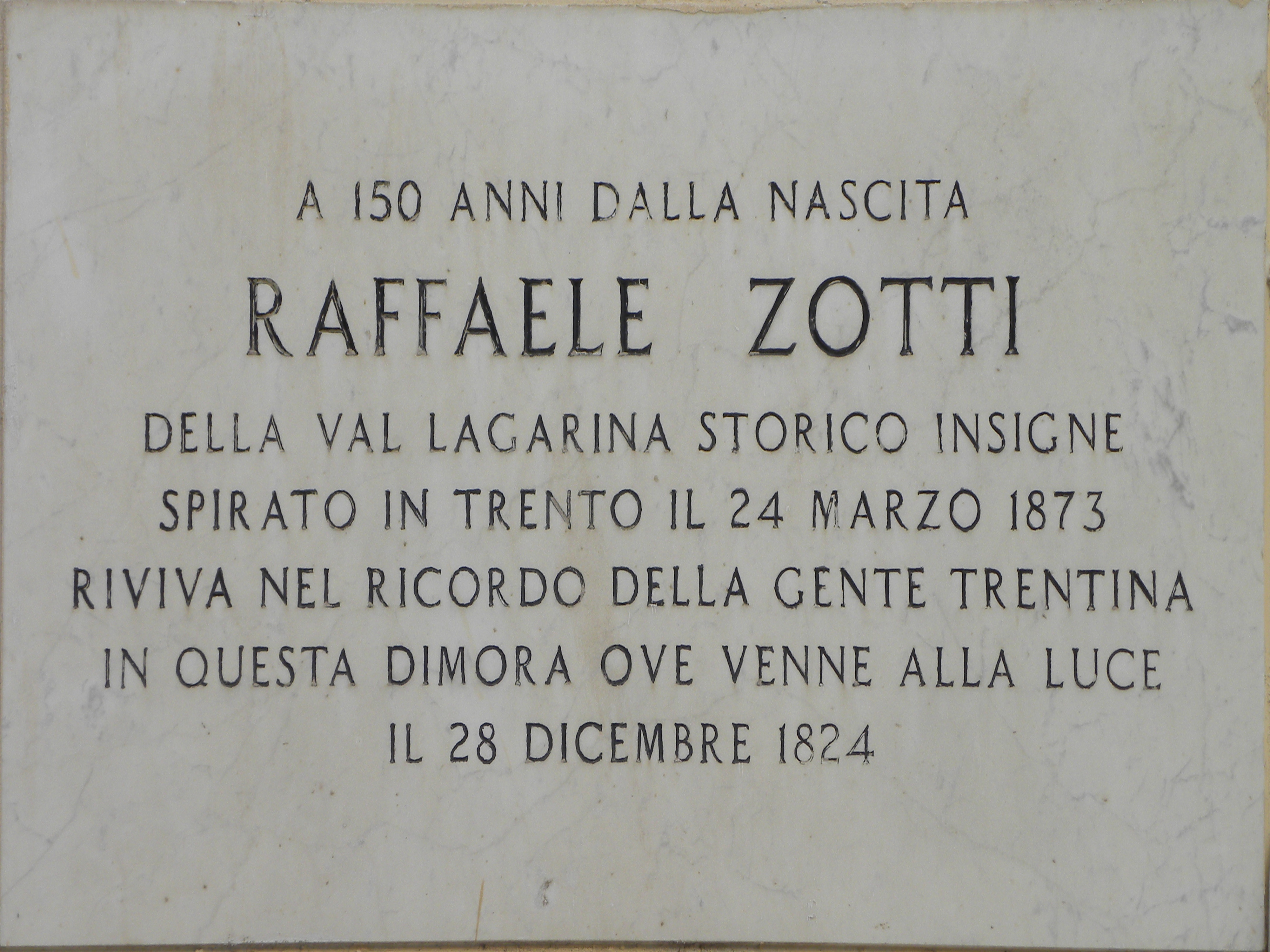 Lapide dedicata allo storico Raffaele Zotti a Borgo Sacco, suo paese di nascita